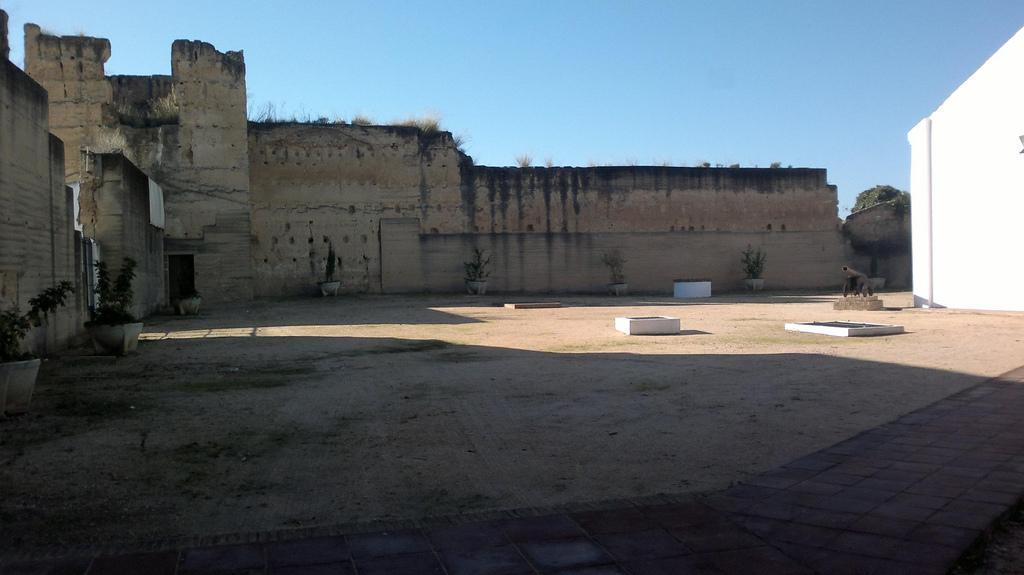 Castillo. Vista de Patio armas y Torre del Homenaje.